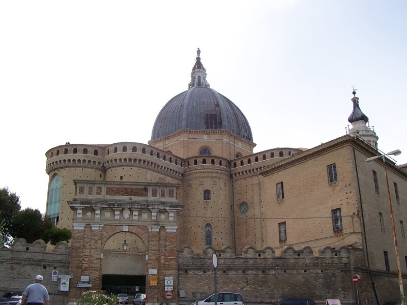 Loreto - Santuario (Abside)